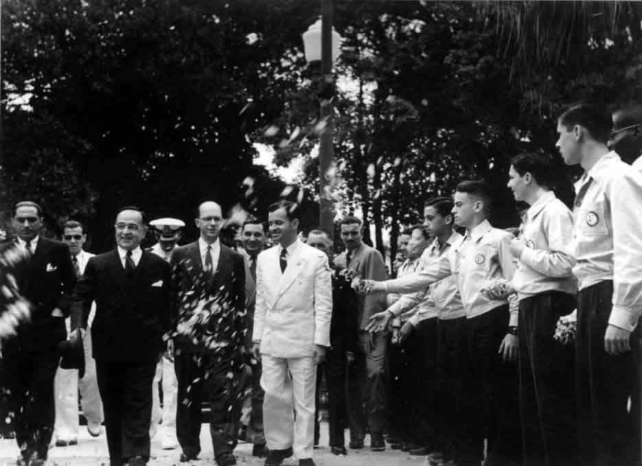 Getúlio Vargas